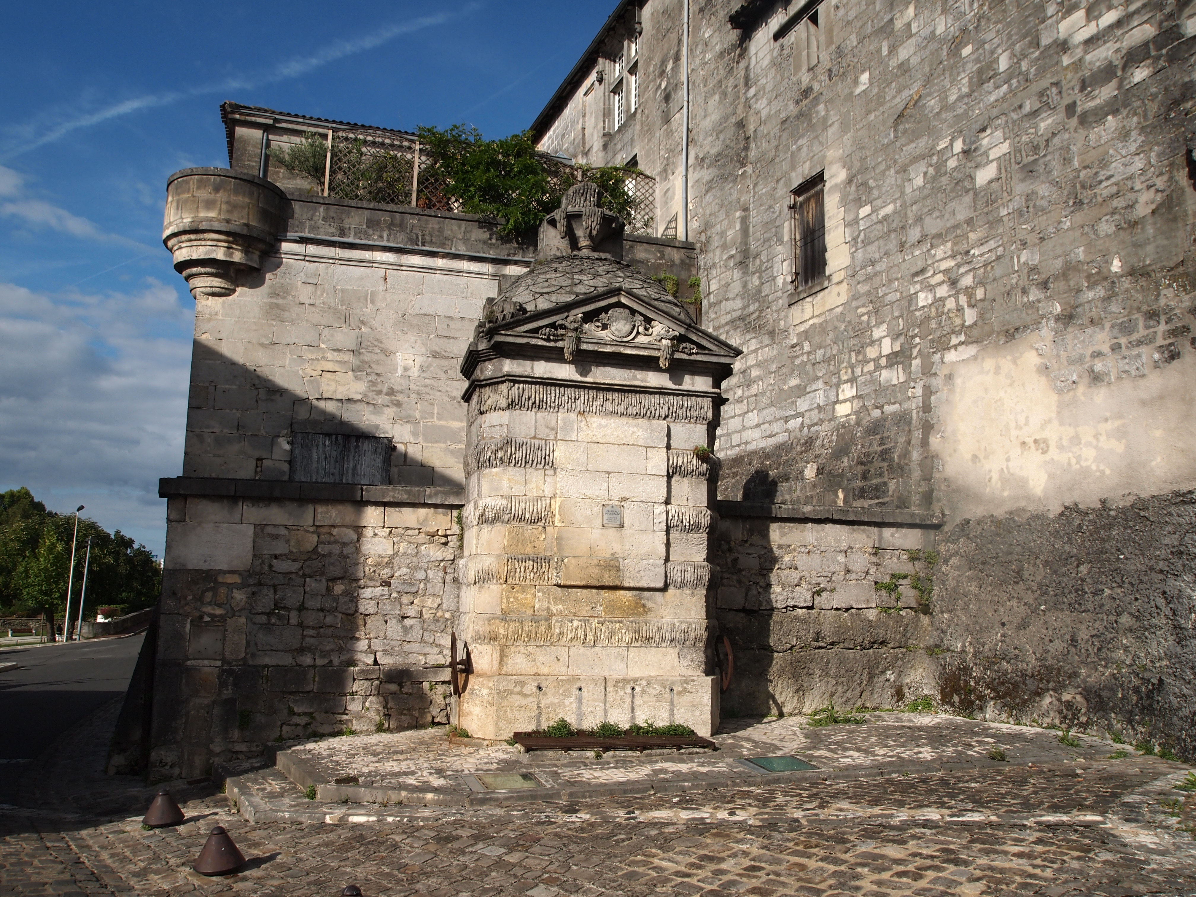 Fontaine dite de François 1° à Cognac